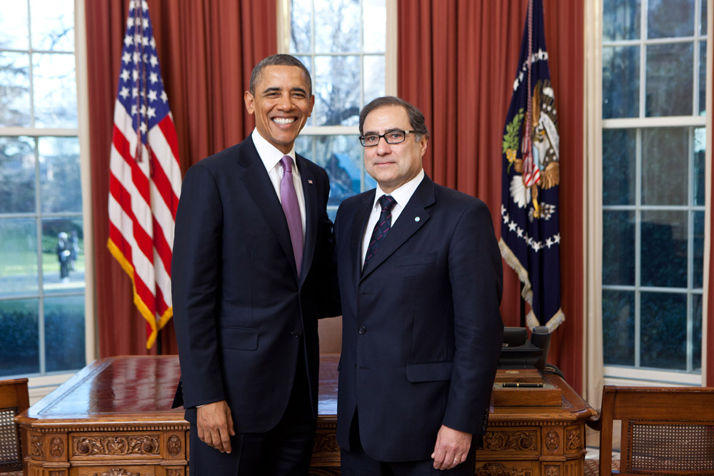 Washington DC. 17-1-2012. Obama recibió a Argüello durante veinte minutos en su despacho de la Casa Blanca.